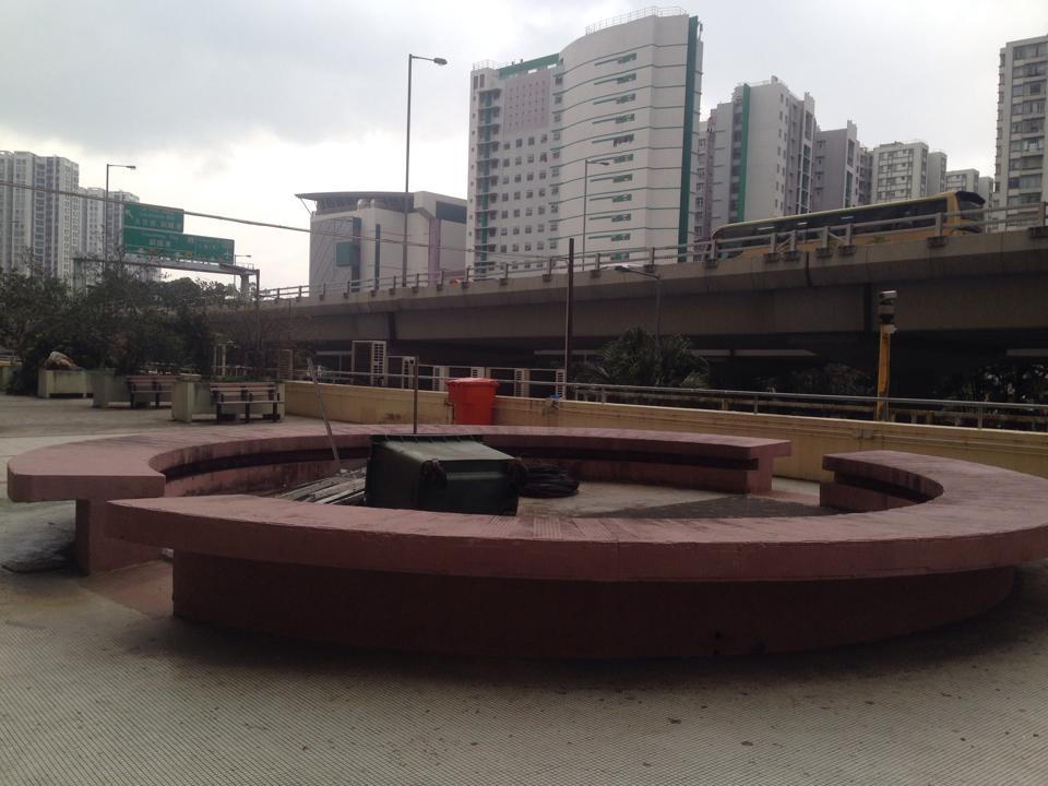 The fountain of Tai On building